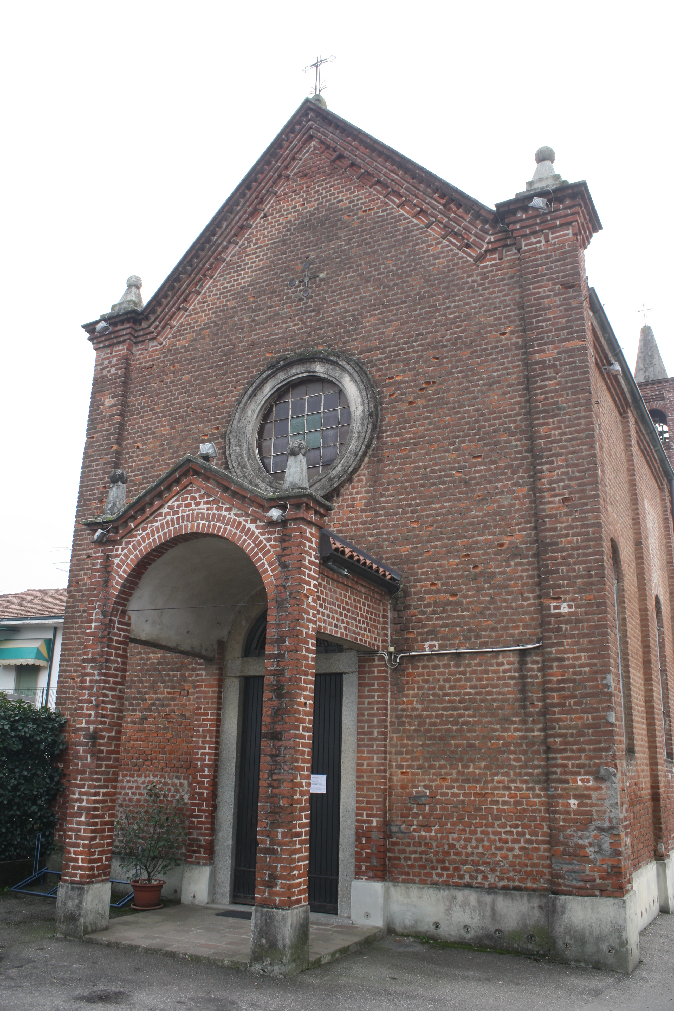 Oratorio di Santa Maria delle Grazie alla Girola a Uboldo, in provincia di Varese.